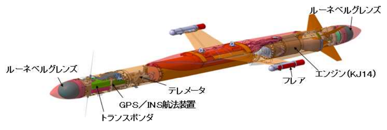 空対空用小型標的 J/AQM-2（川崎重工業が作成）の構造図